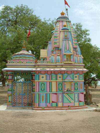 Ein hinduistischer Schrein in Varahi (Gujarat)